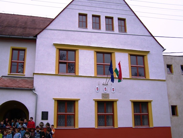 A felsőszölnöki Kossics József Általános Iskola a felújítás után